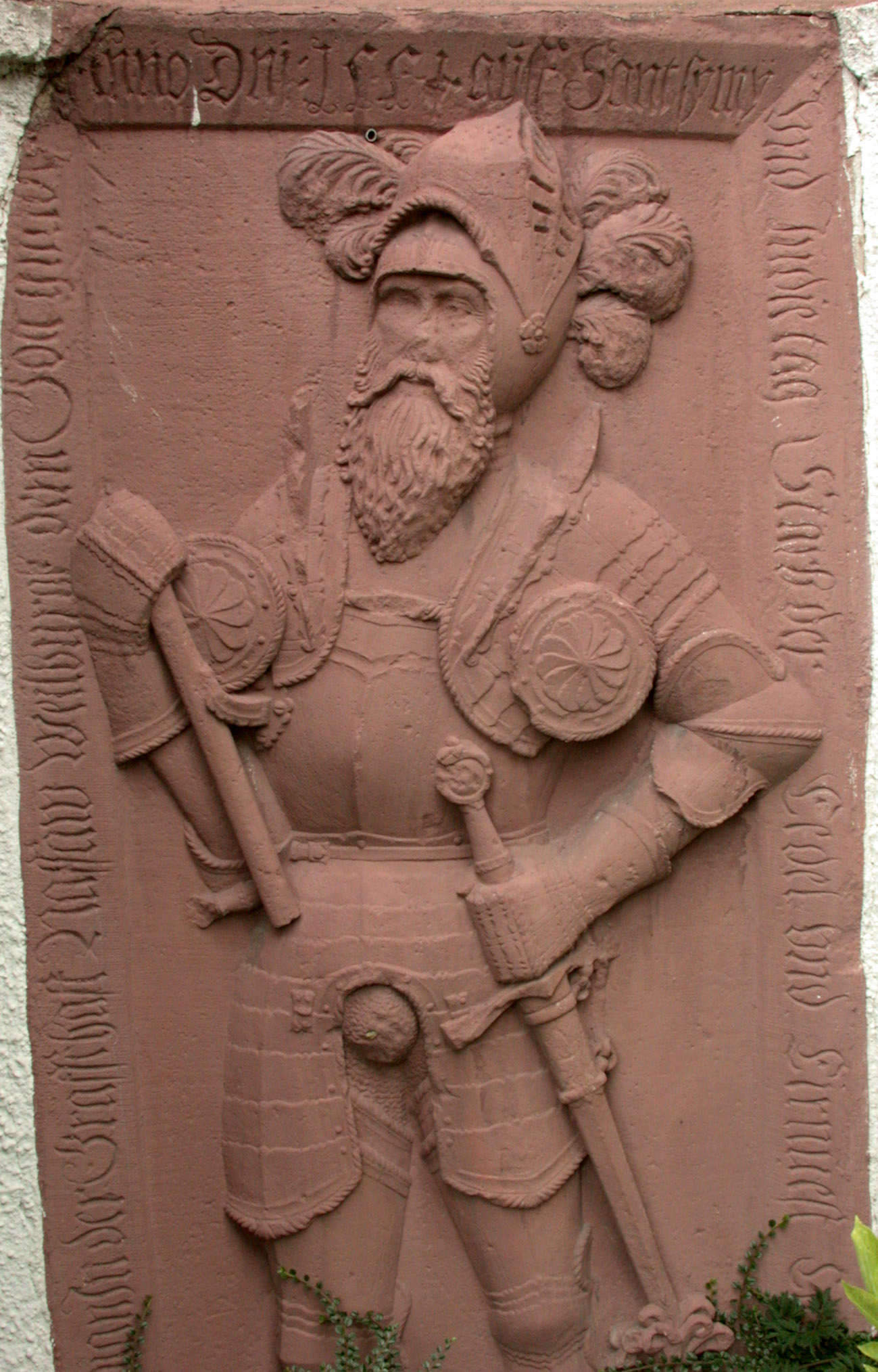 Grabplatte an Laurentiuskirche, Usingen, Deutschland, Carl von Stockheim († 1551)